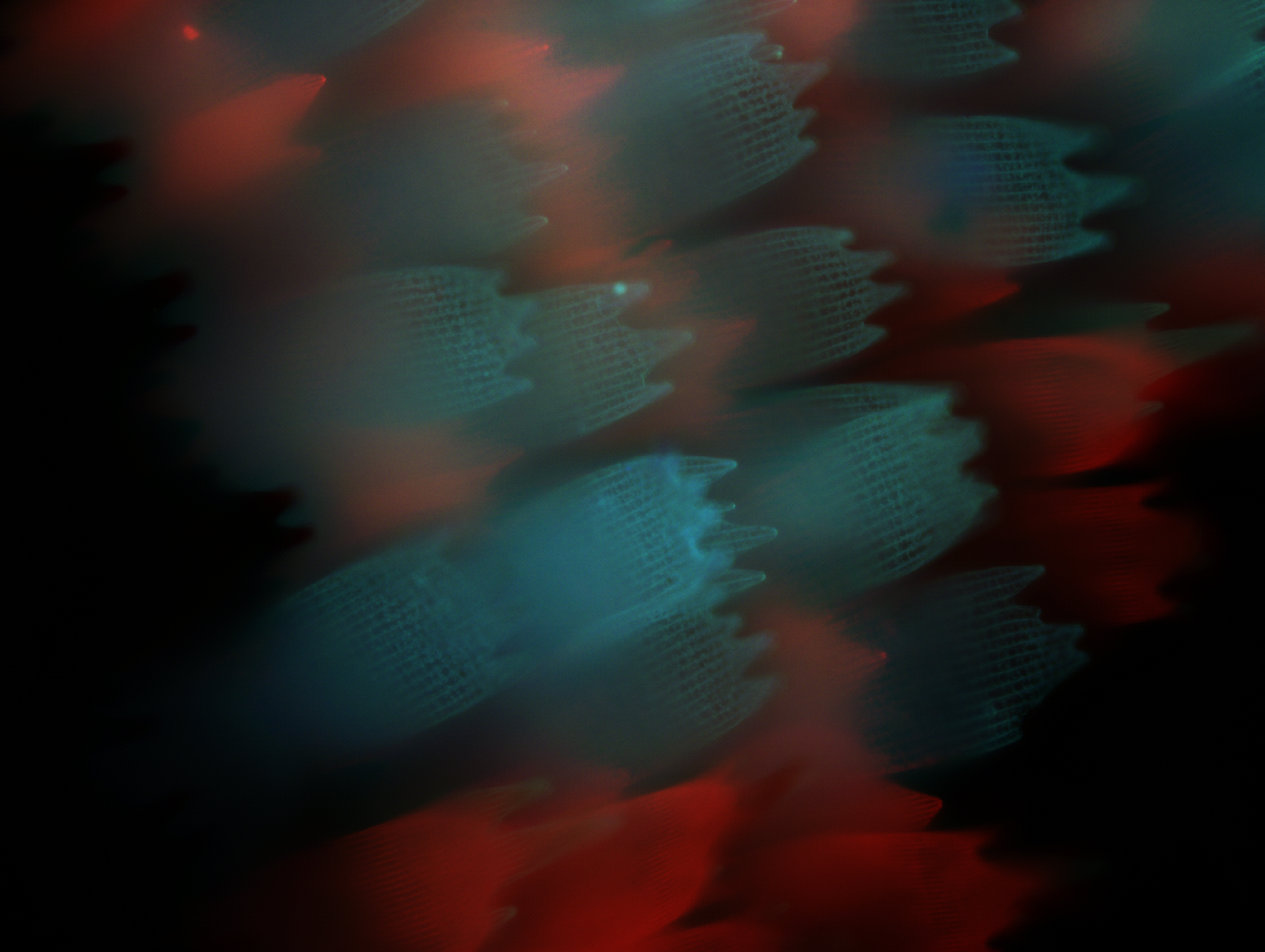 Šupiny na povrchu křídla tropického motýla Caligo sp., foceno pod fluorescenčním mikroskopem.